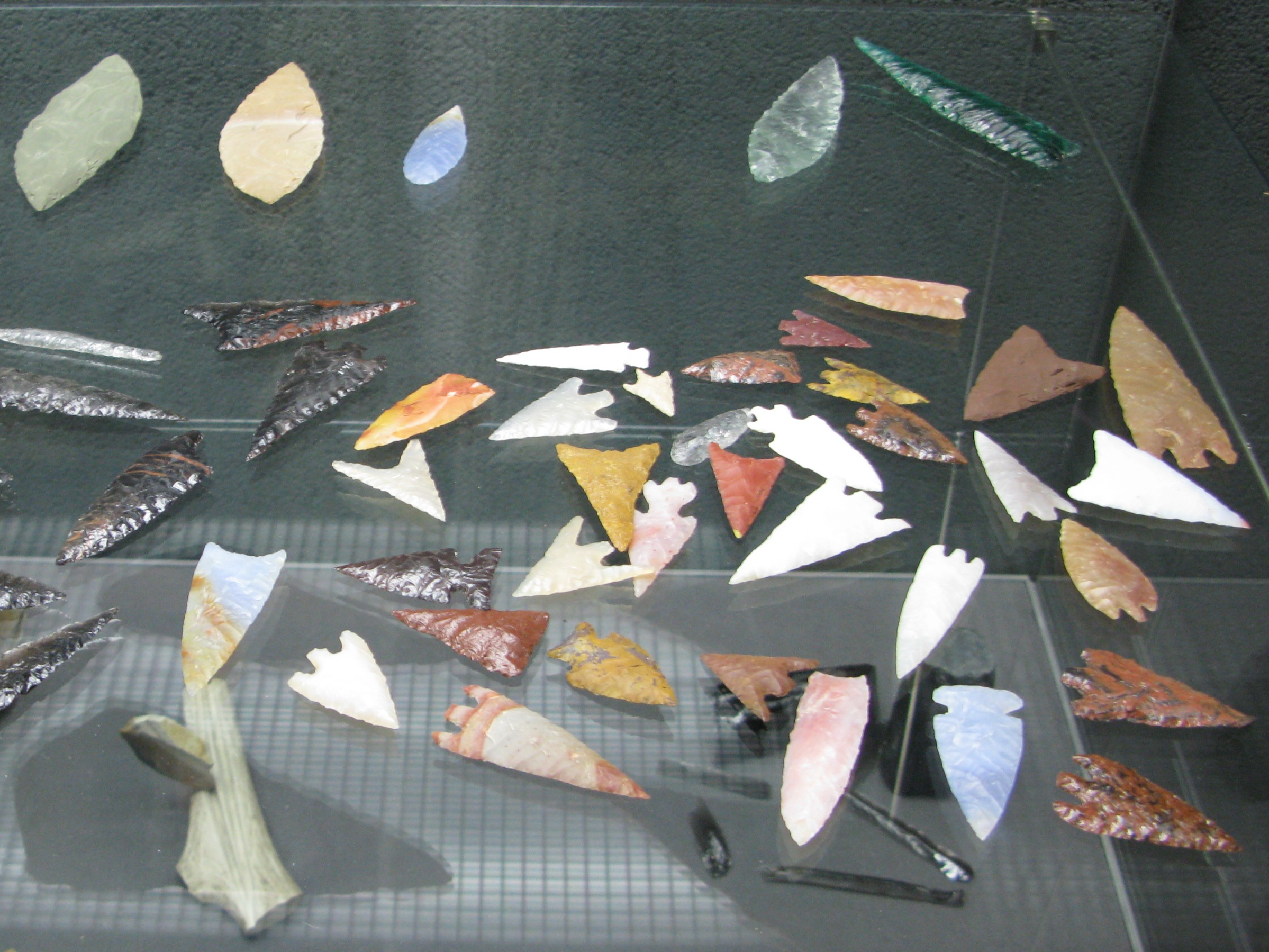 Description